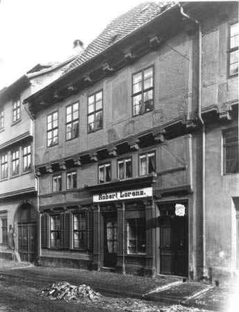 Breite Straße 41 in Quedlinburg, fotografie aus der Zeit um 1900